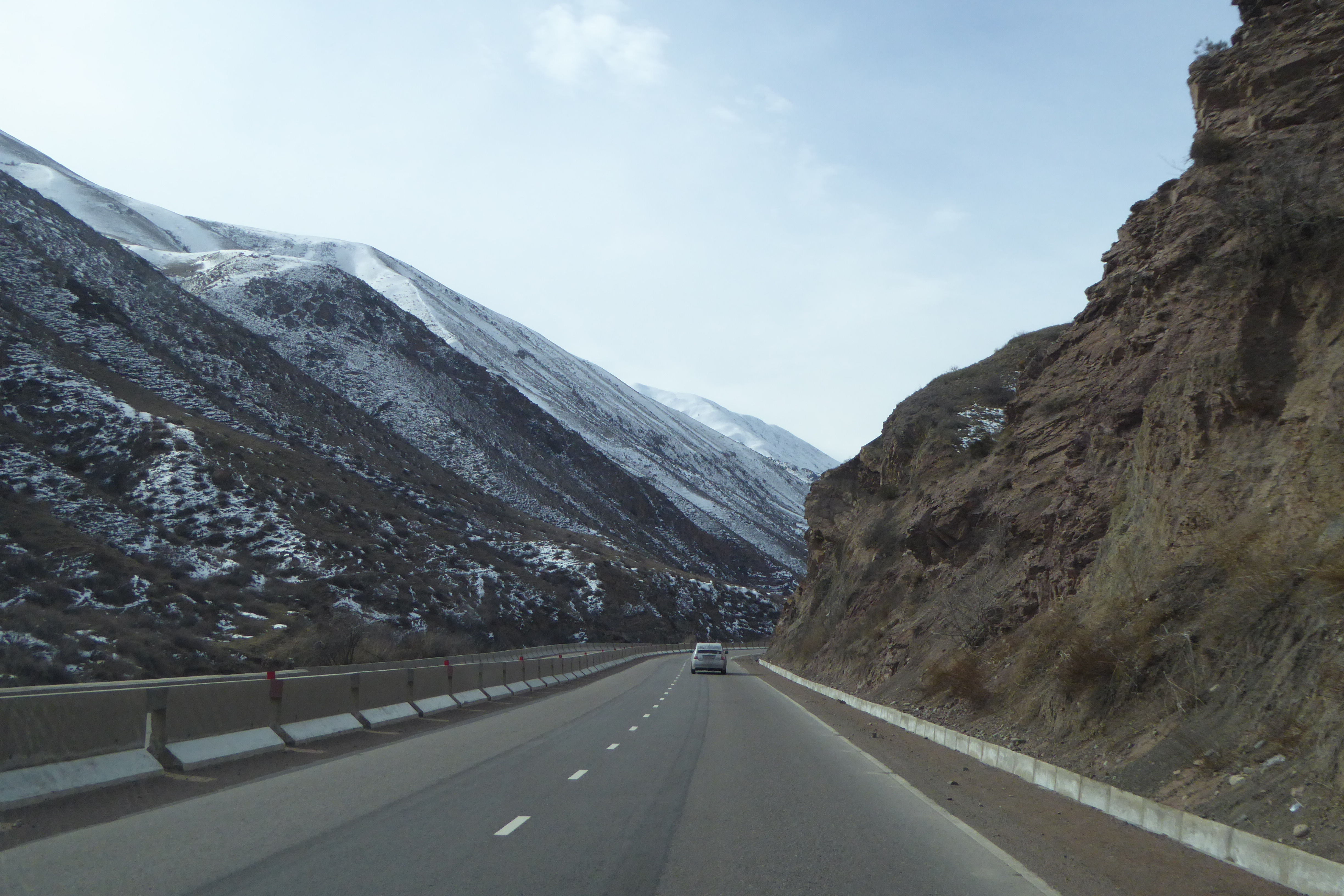 Einhausung zum Schutz vor Steinschlag auf der Bahnstrecke Bischkek-Balyktschy nähe Orlovka, Kirgistan